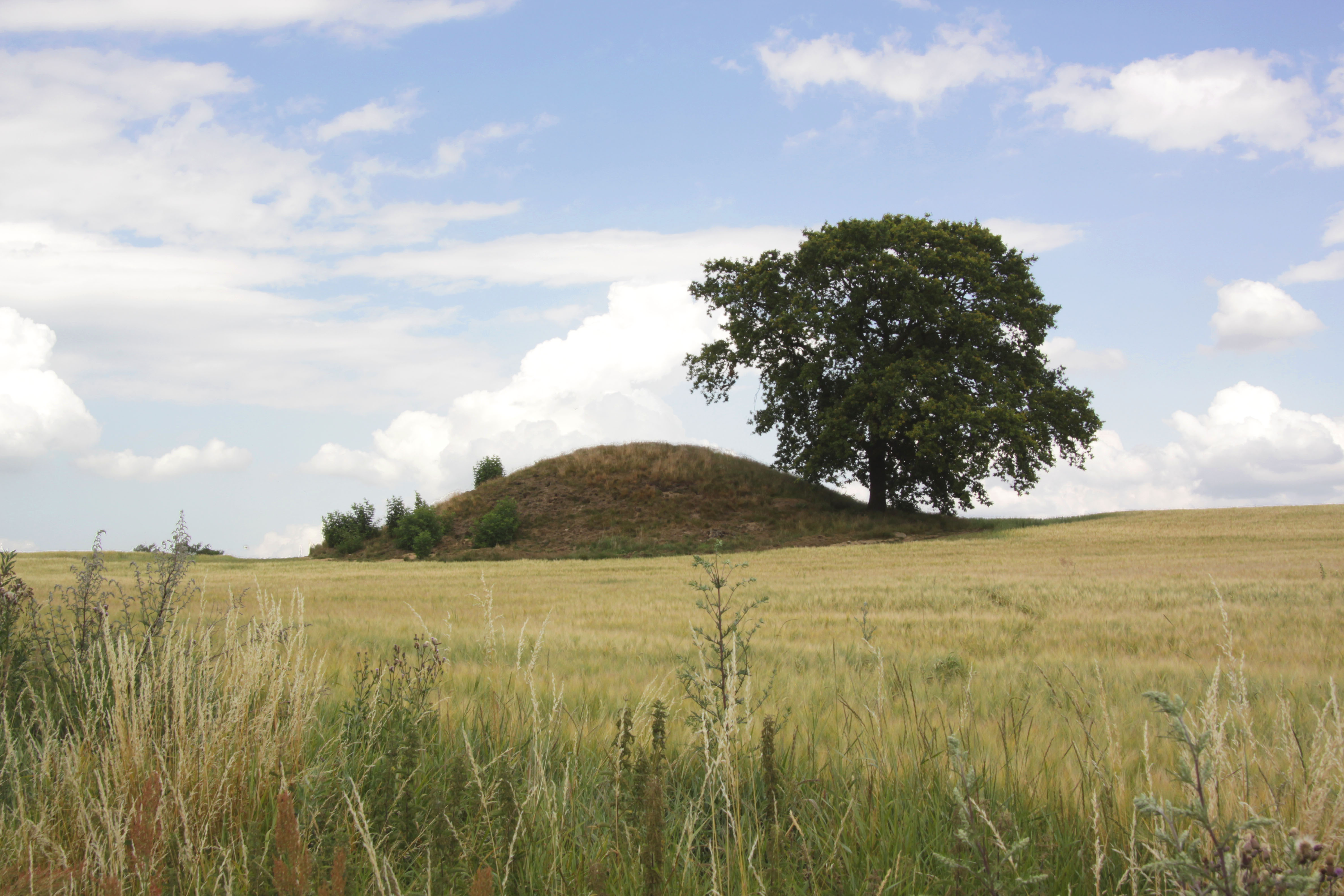 Helsingborg. Gröte Hög, nära Ättekulla.